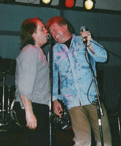 Phil May & Skip Alan von The Pretty Things, Eigenes Photo von 1999, Fotograf: Sergius